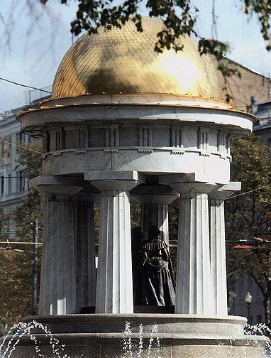 Фонтан ротонда снят мною со стороны Тверского бульвара